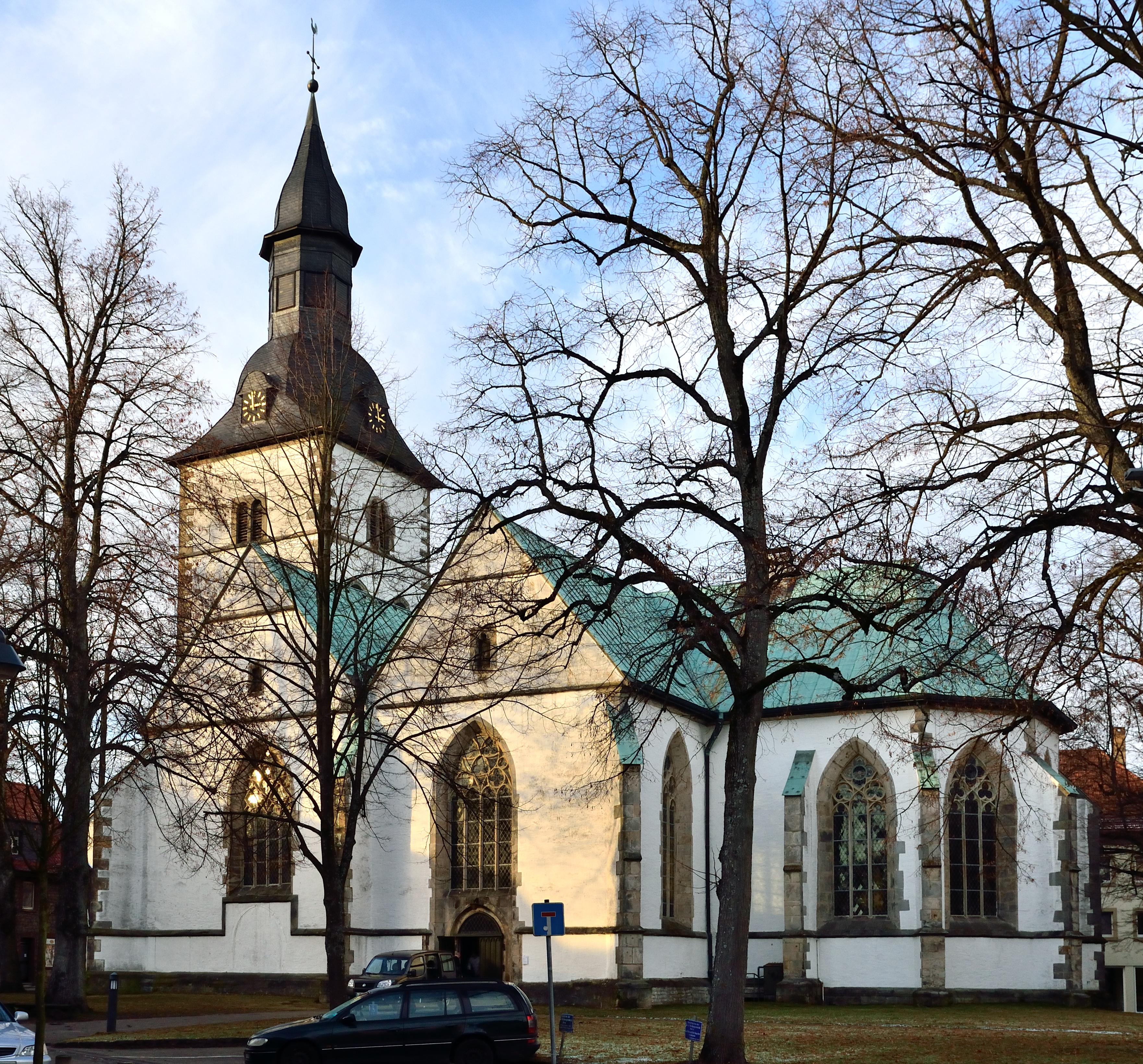 This is a photograph of an architectural monument. .4 Evangelisch-reformierte Kirche Horn, Südseite